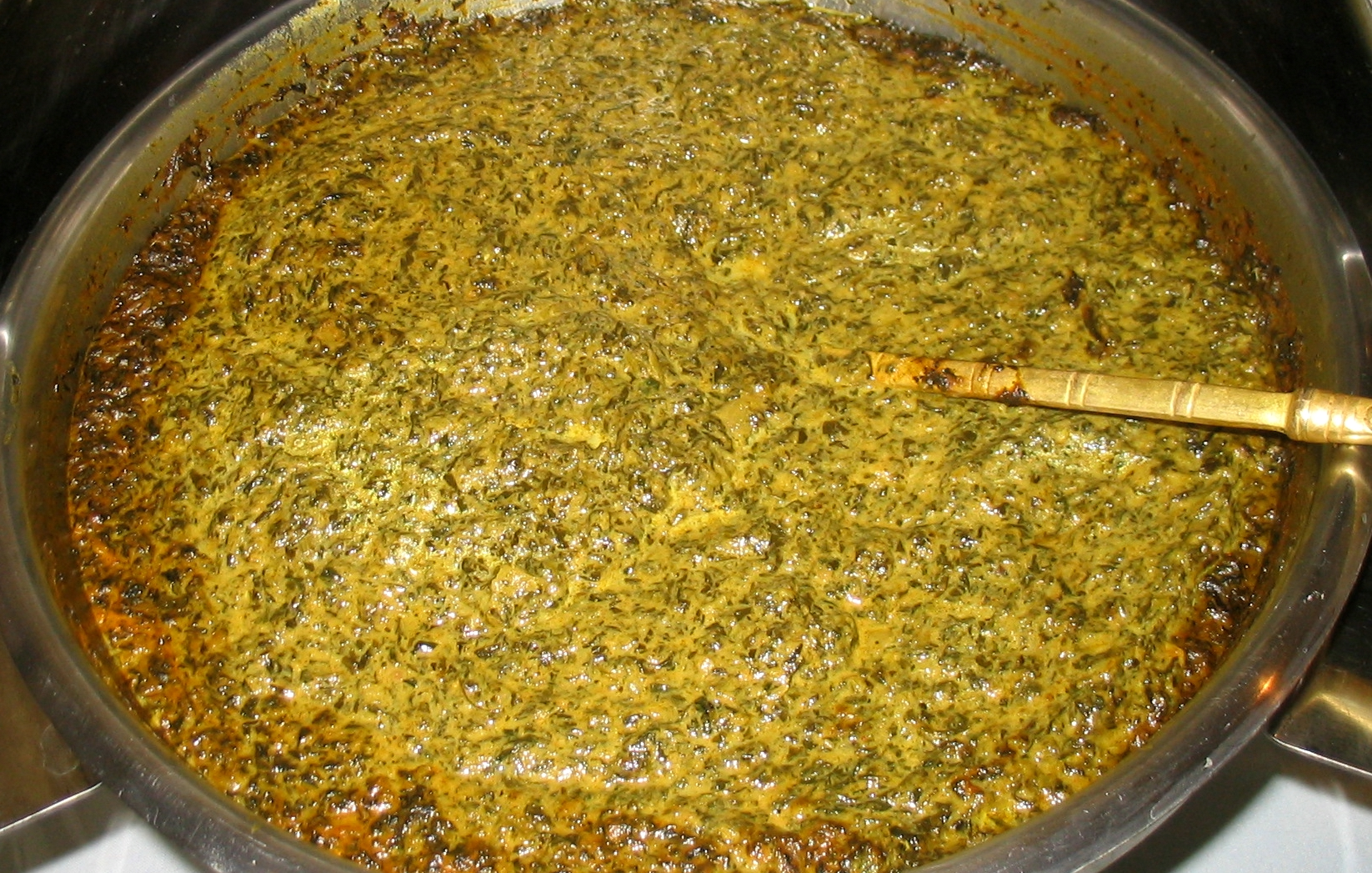 Saag paneer, an Indian dish.